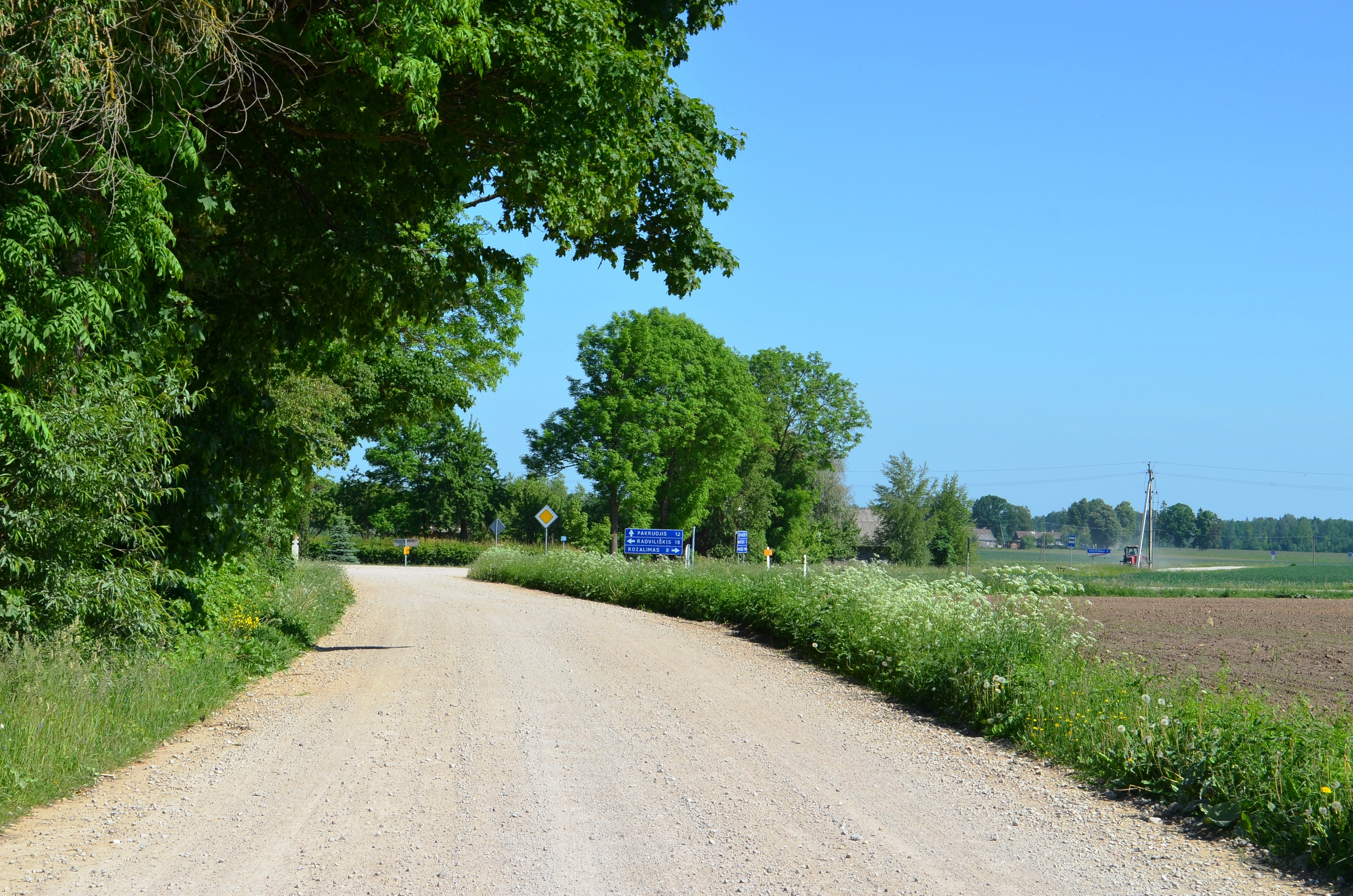 Derveliai, Pakruojo raj.